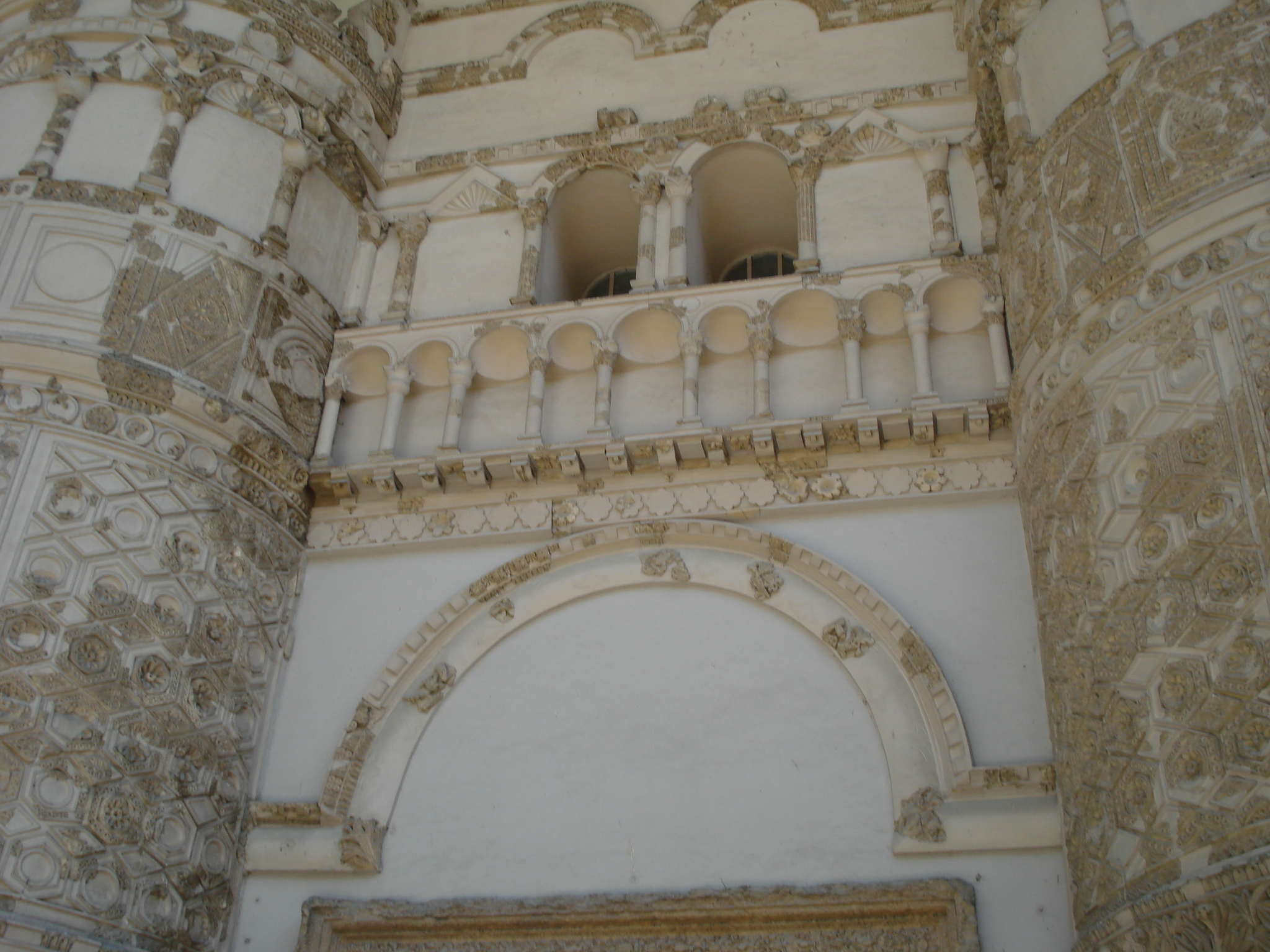 واجهة قصر الحير الغربي التي تم نقلها لتصبح واجهة متحف دمشق الوطني